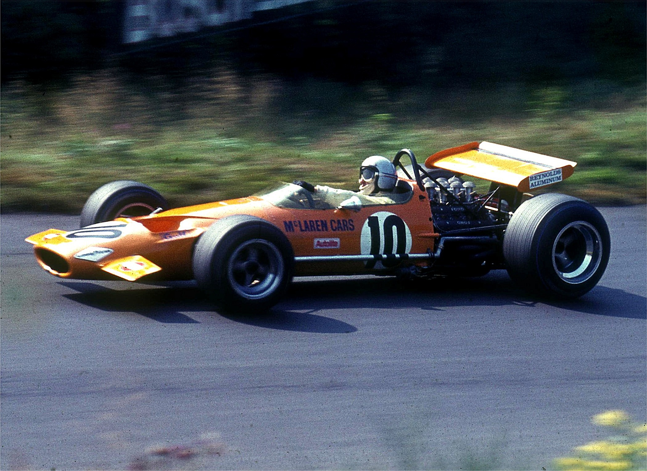 Bruce McLaren im McLaren M7A in der Auffahrt zum Karussell des Nürburgrings beim Großen Preis von Deutschland 1969.